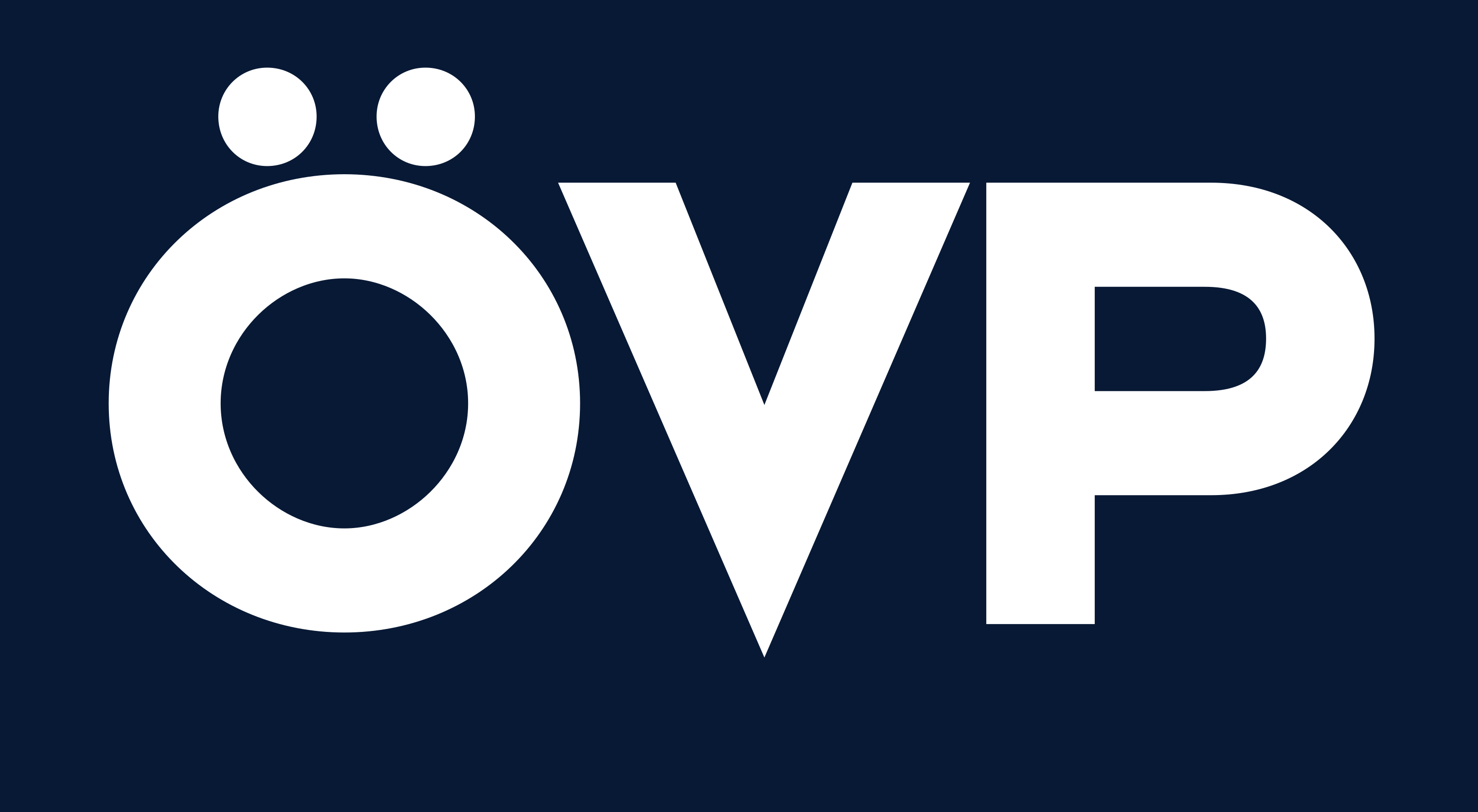 Logo del Partido Popular de Austria